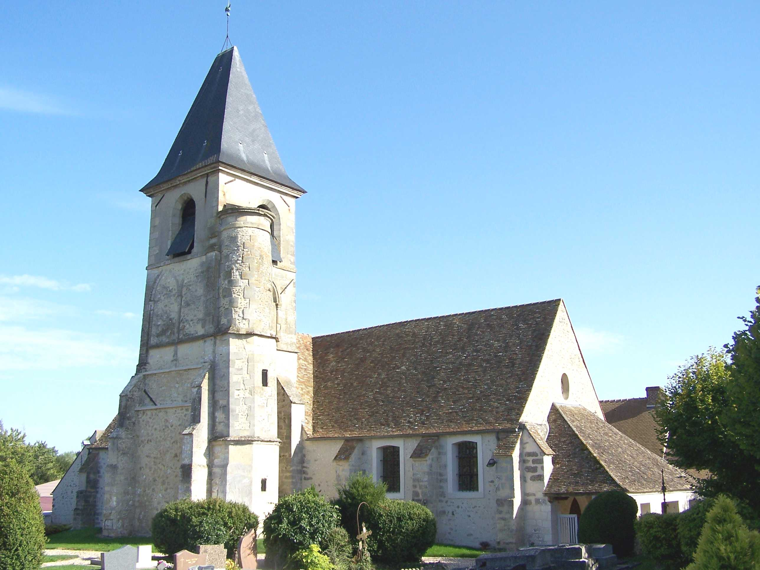 Église de Vicq (Yvelines, France)